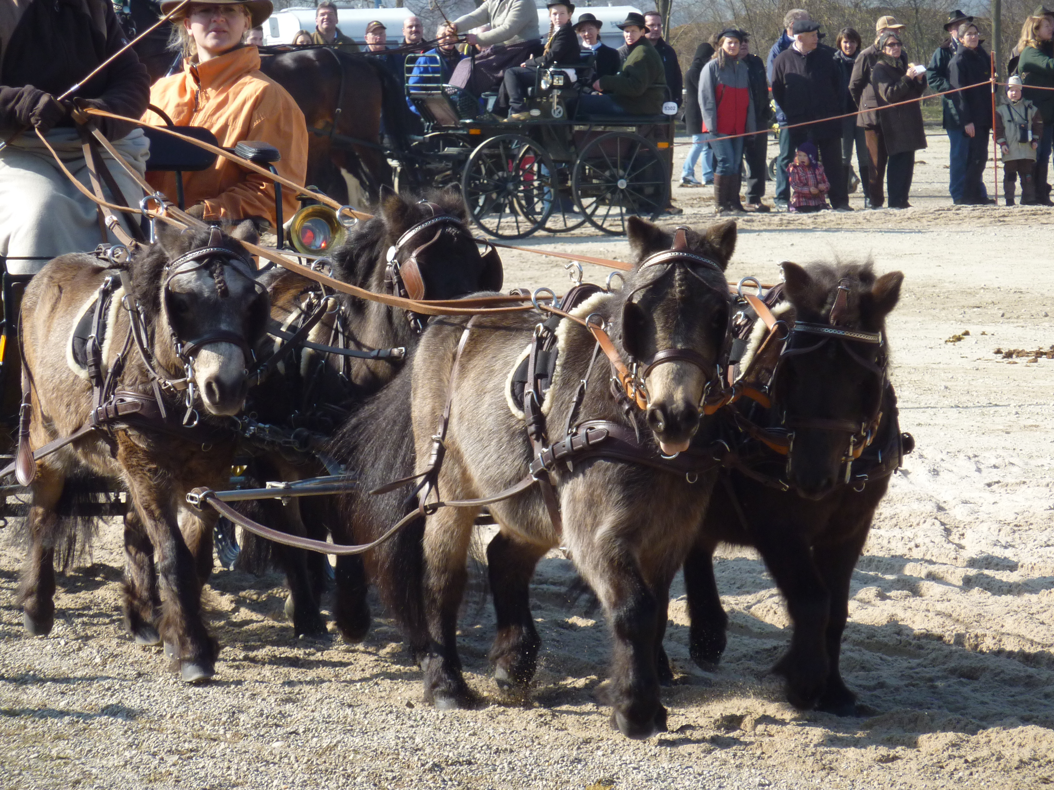 Bernhausener Pferdemarkt, een vierspan shetlandpony's